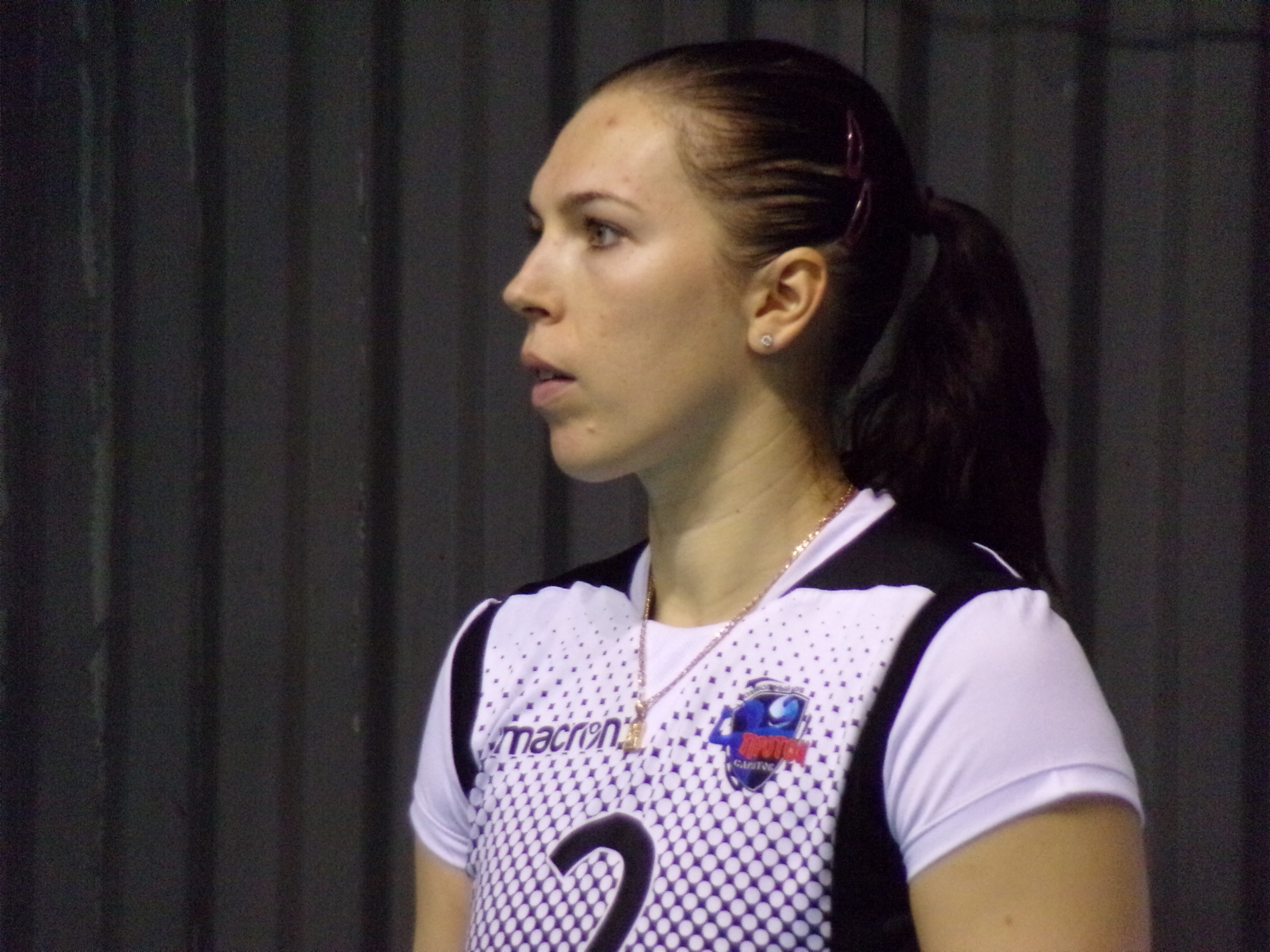 Анна Макарова в составе команды "Протон", 09.02.2018